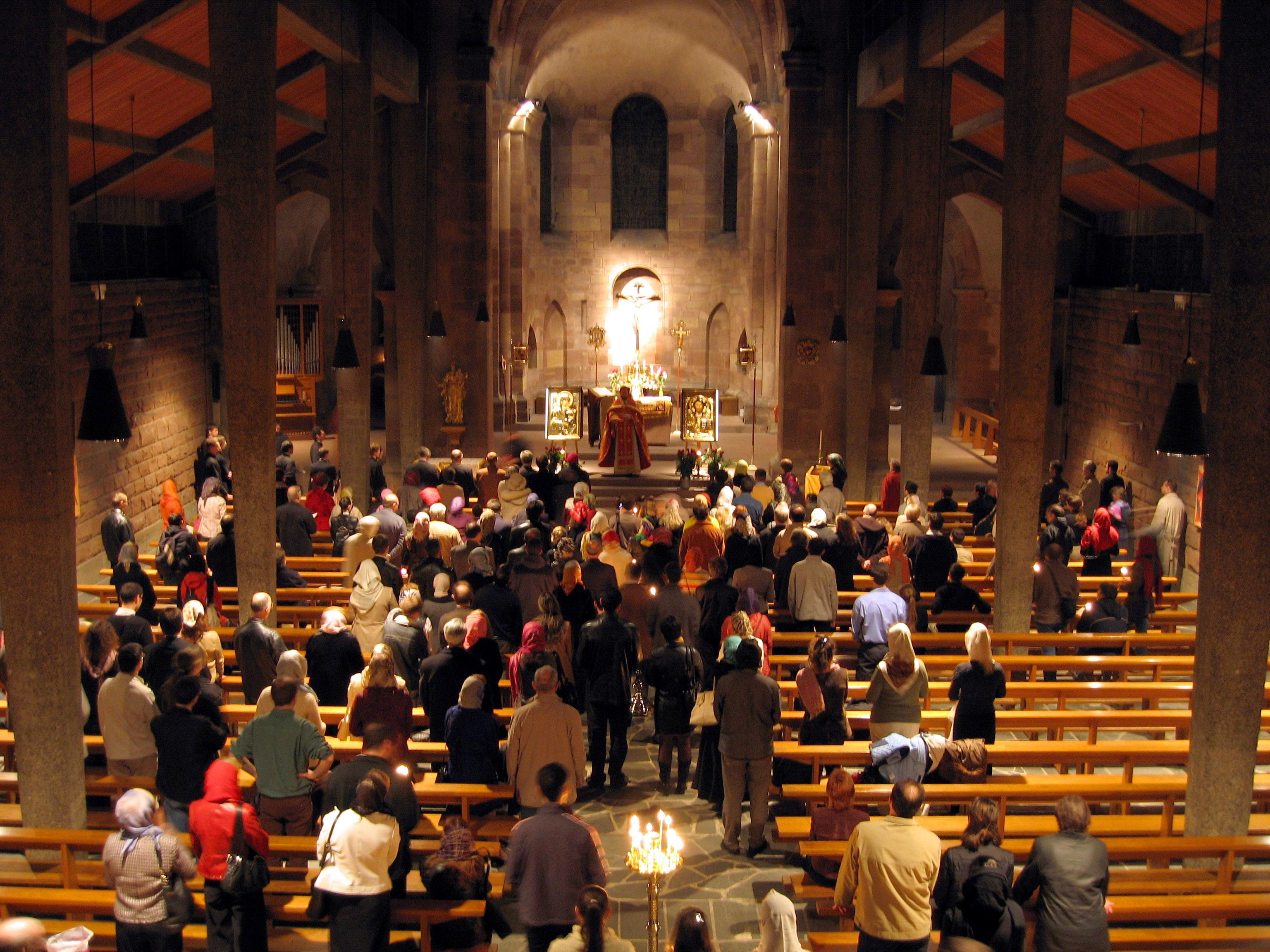 В 2006 году впервые в Страсбурге было проведено столь многочисленное пасхальное богослужение Русской Православной Церкви. Православным позволили отслужить Пасху в самой старинной церкви города, посвященной святому первомученику Стефану (Eglise Saint-Etienne) и принадлежащей Католической Церкви. В богослужениях Великой Субботы и Пасхи принял участие хор Сретенской Духовной семинарии.